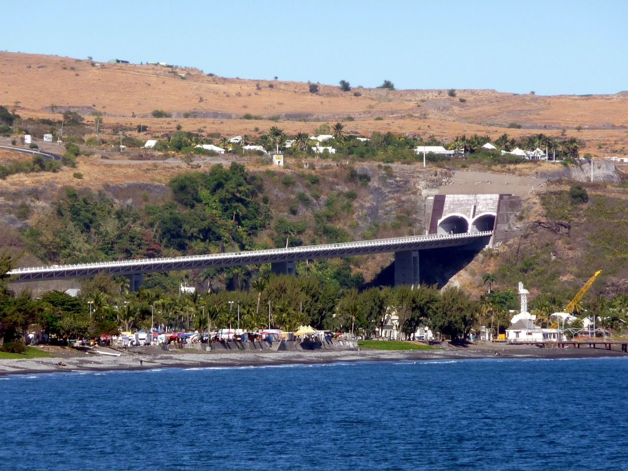 Viaduc et tranchée couverte